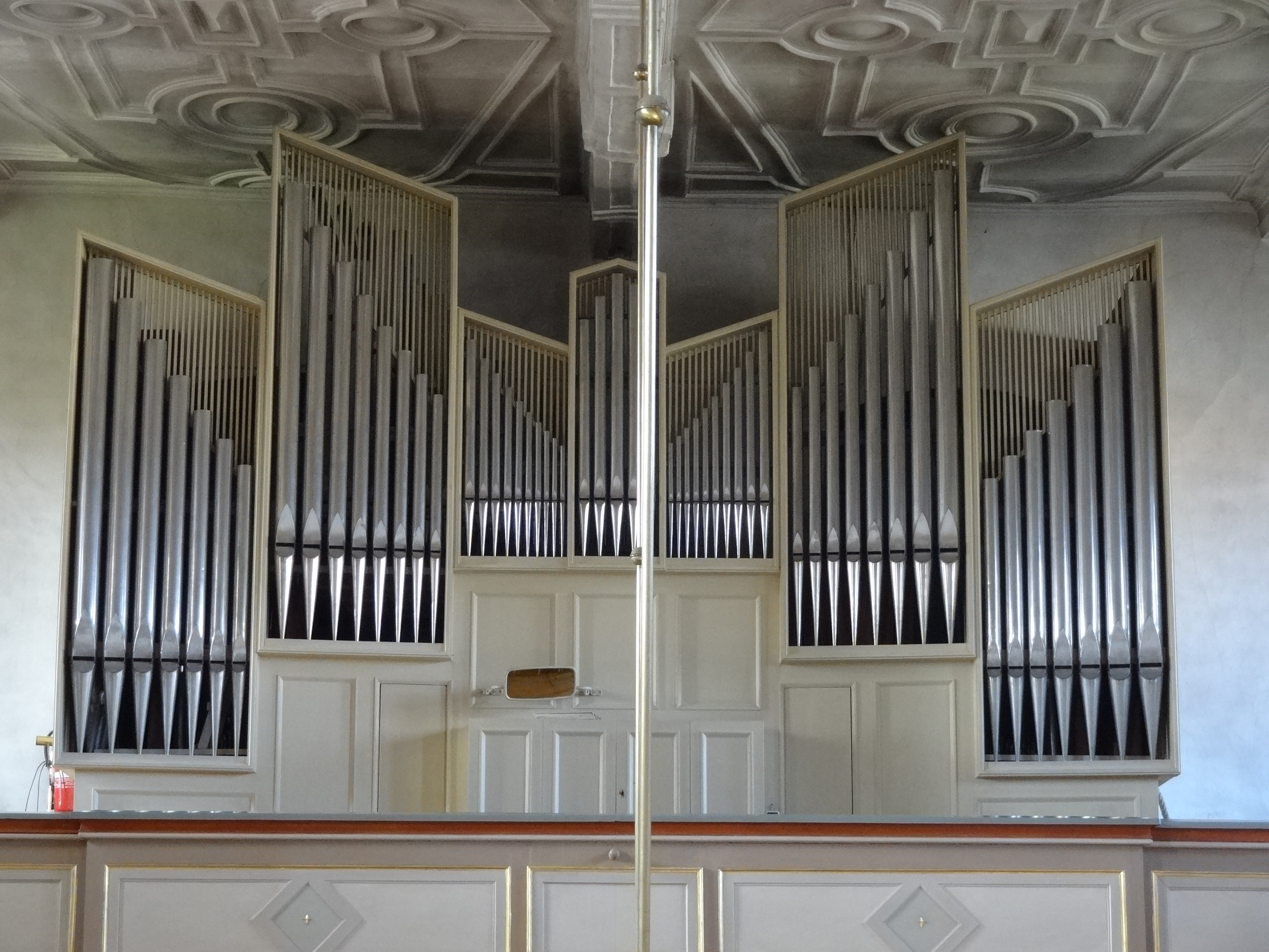 Evangelische Stadtkirche Hungen Orgel